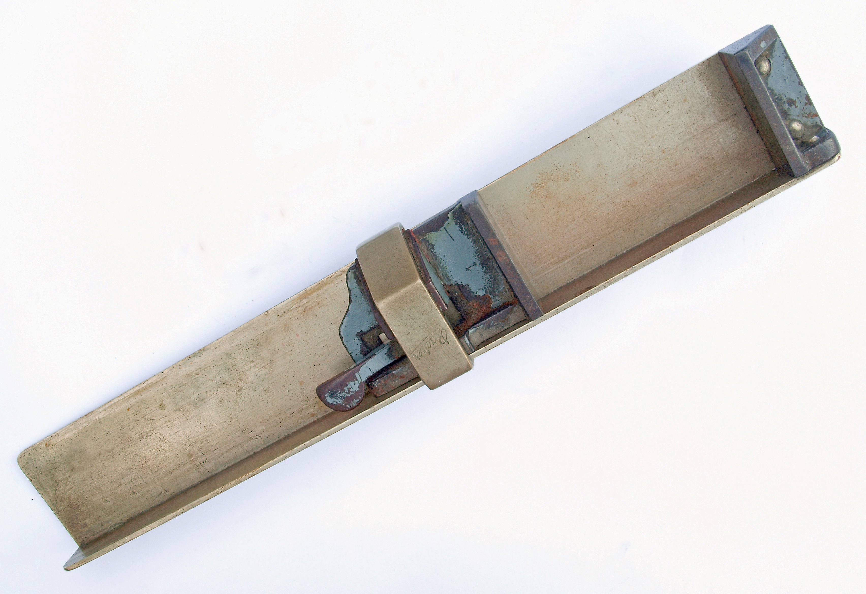 Handwerkszeug des Schriftsetzers.